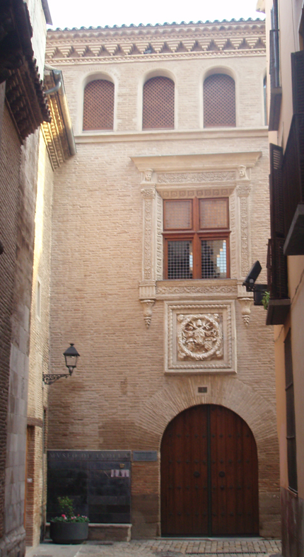 Fachada principal del Palacio Decanal (Tudela), en 2010